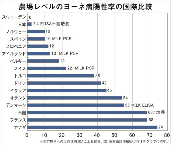 国際的なヨーネ病発生状況を示すグラフ。日本以外に国全体の調査をやっている国はないので、報告された発生状況を参考までに提示している。